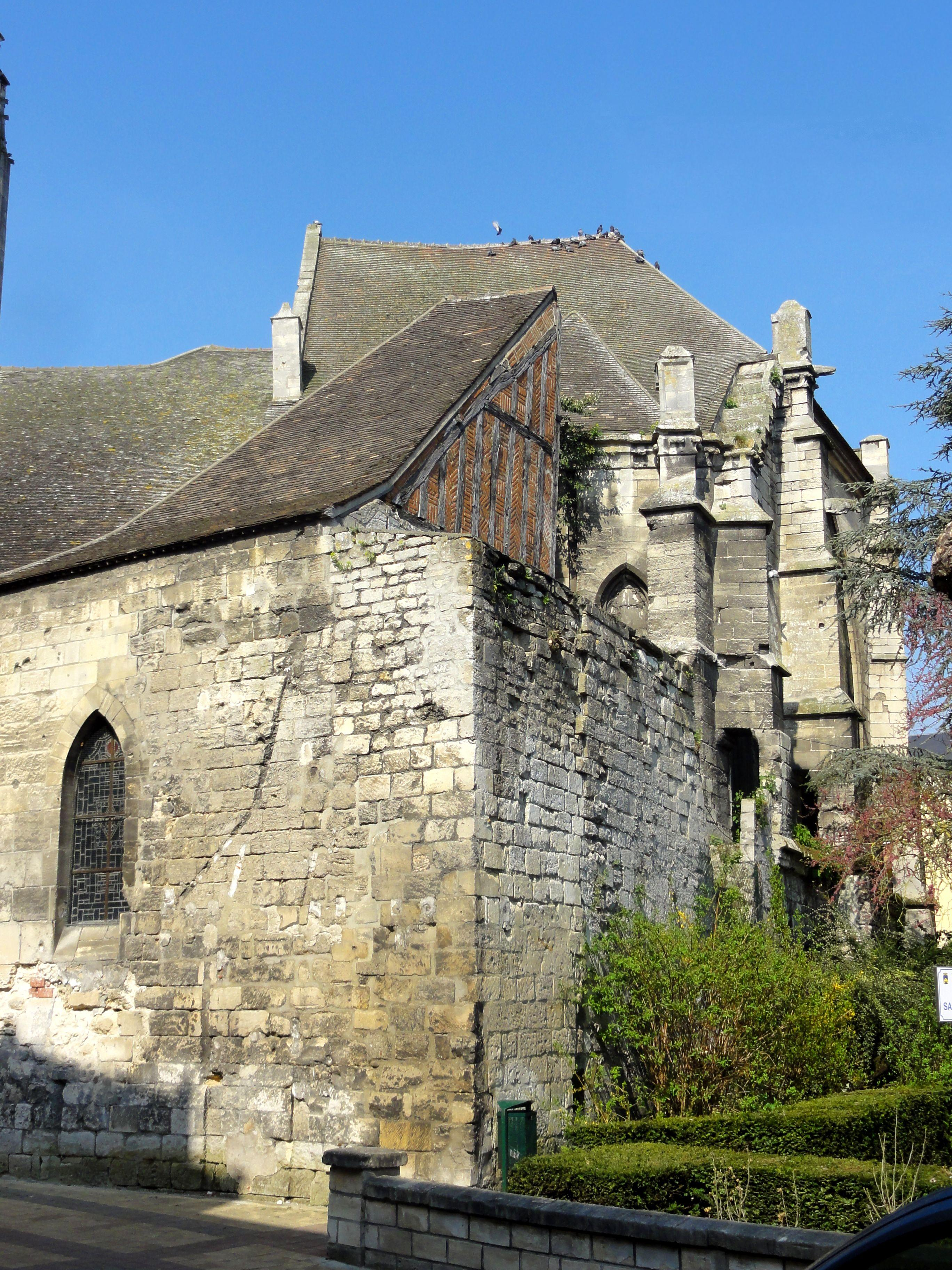 Angle nord-est de l'église, avec sa partie la plus ancienne, la chapelle du début du XIIIe siècle comportant un pan de l'ancien mur d'enceinte de la ville de Creil.